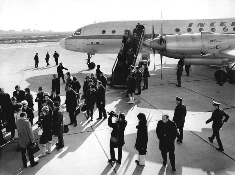 Leipzig, Flughafen, Flugzeug, ankommende Passagiere Zentralbild Bartocha 12.3.1971 Leipzig: Leipziger Frühjahrsmesse 1971: Internationaler Messe-Flugverkehr herrscht auf dem Messeflughafen Leipzig-Schkeuditz. Täglich 20 Maschinen landen hier. Auf unserem Foto sind Messegäste aus Prag eingetroffen. (Bitte beachten Sie hierzu unsere ADN-Meldung!)